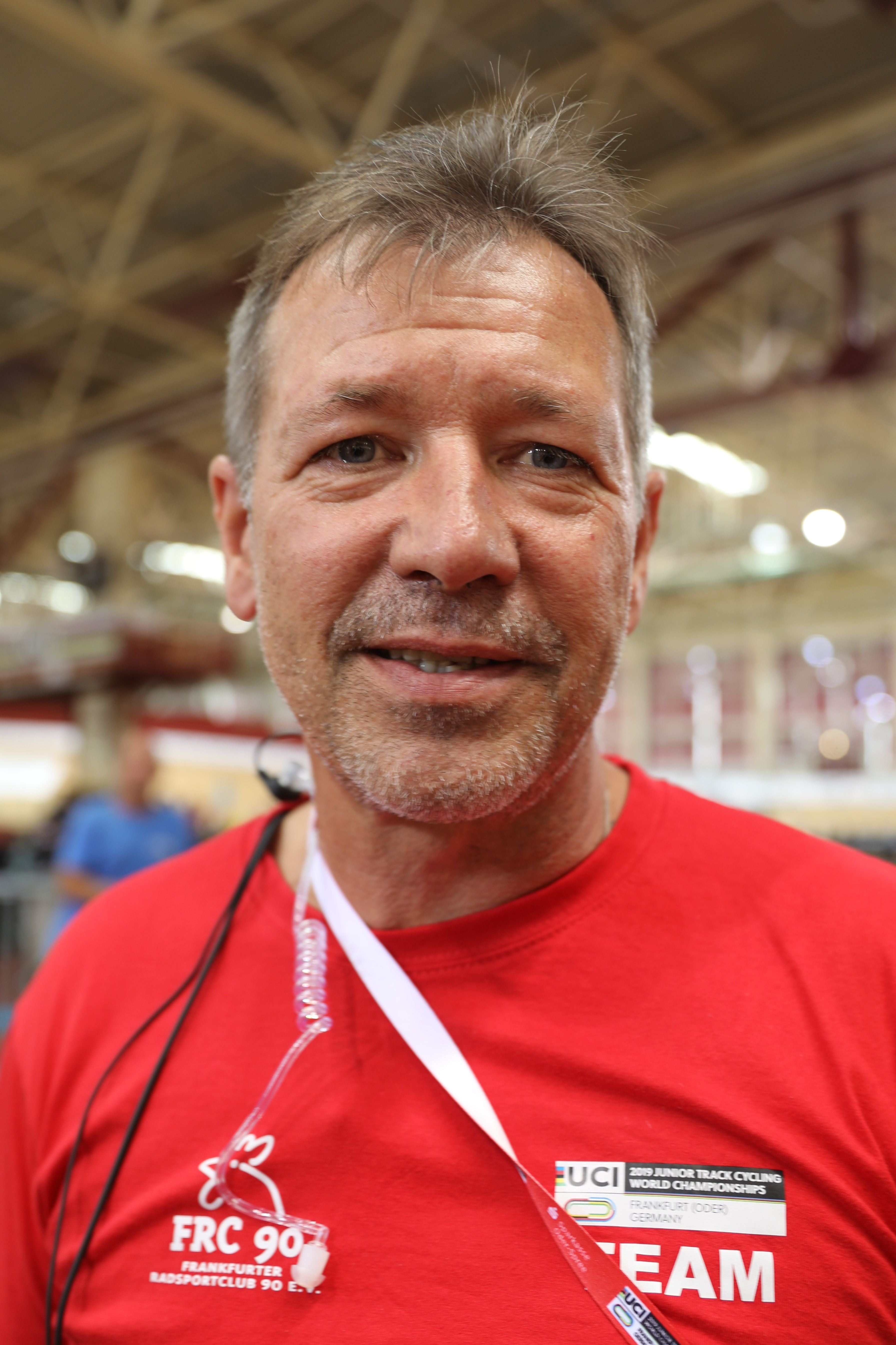 Dan Radtke, Trainer und Radsportfunktionär und ehem. Radsportler